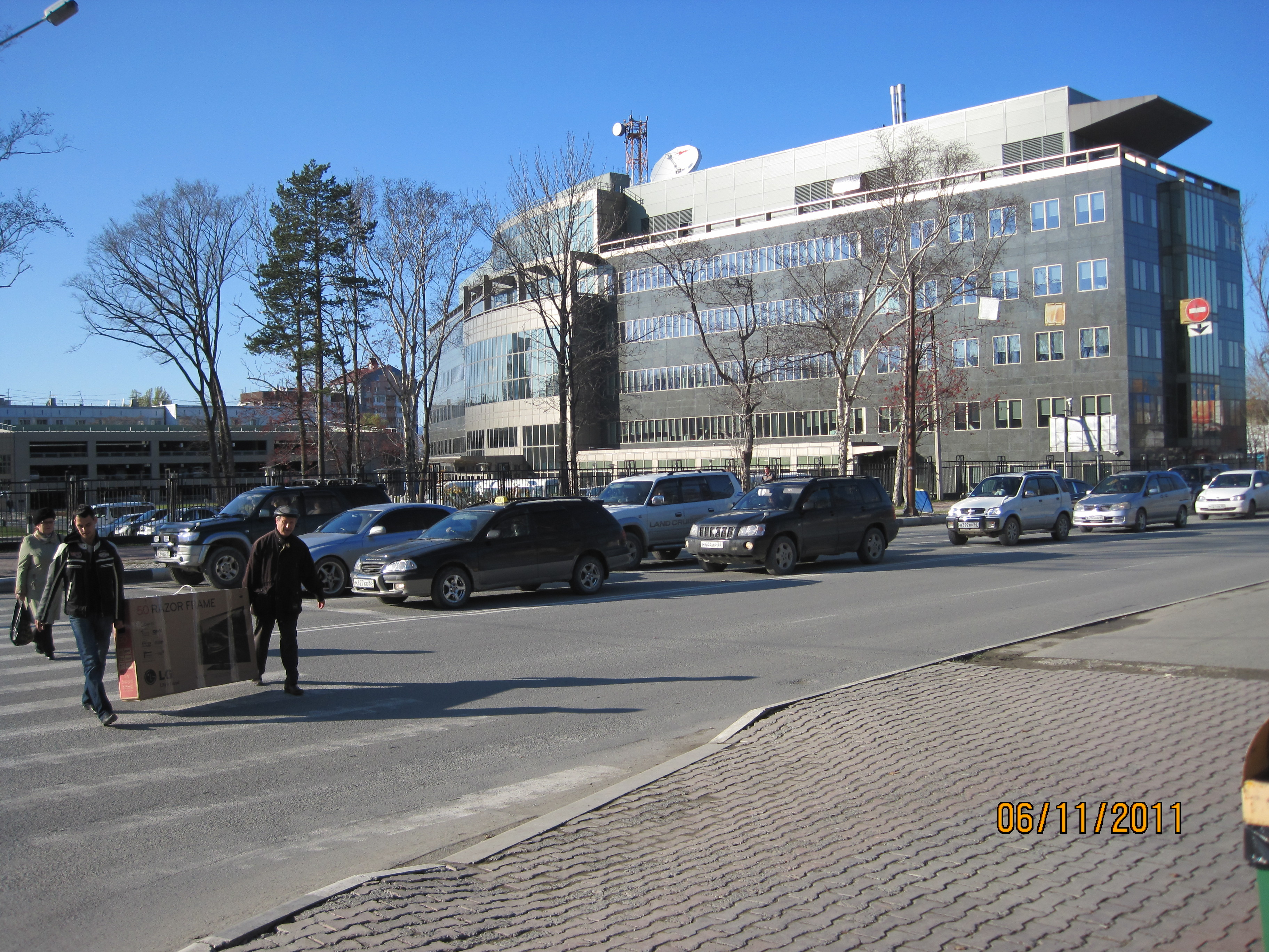 Офис компании Exxon Neftegaz Limited в Южно-Сахалинске. Перекресток пр. Мира и ул. Сахалинской